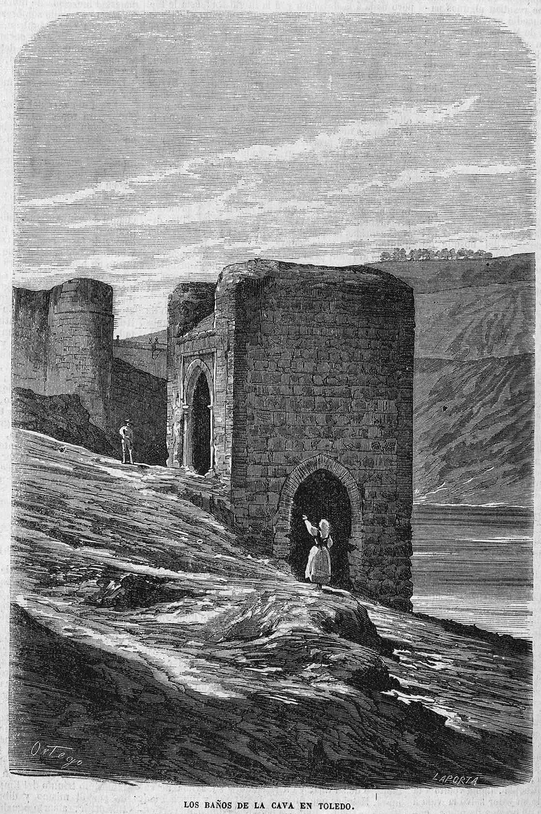 Los Baños de la Cava en Toledo, en la revista española El Museo Universal.